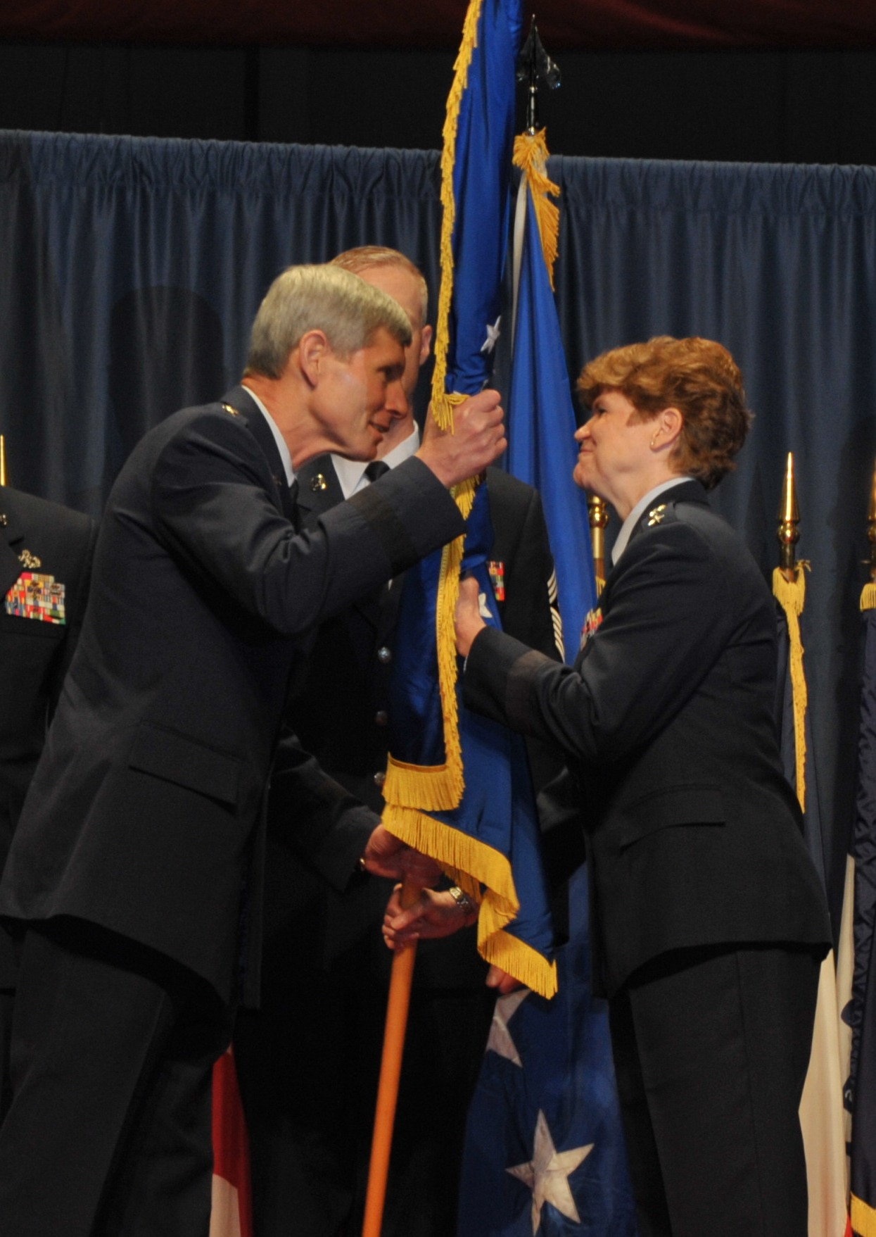 Norton A. Schwarz & Janet C. Wolfenbarger; Kommandoübergabe Air Force Material Command (AFMC) am 5. Juni 2012